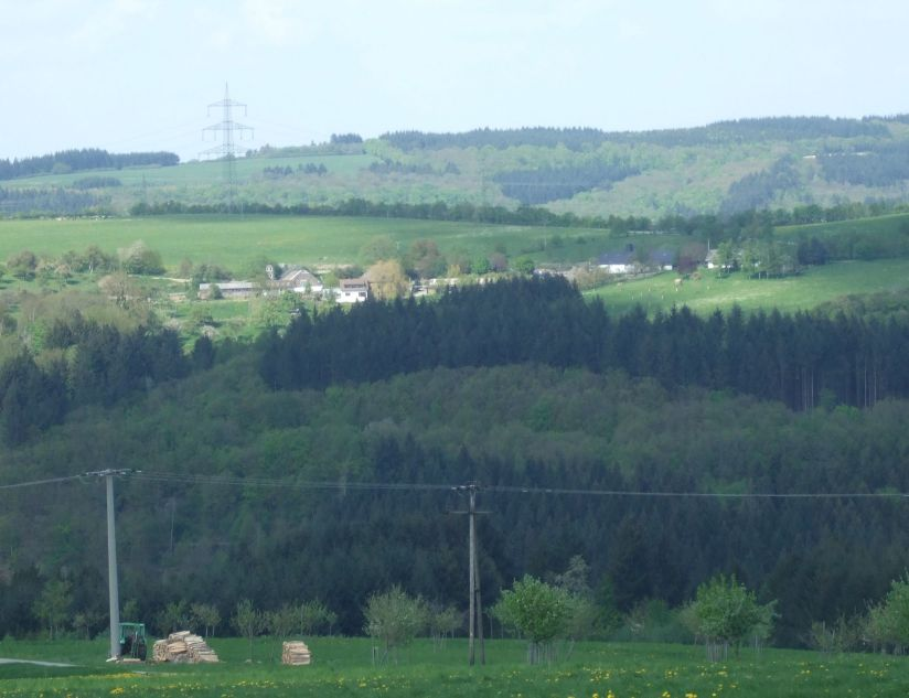 Thomm, Ansicht Fellerhof